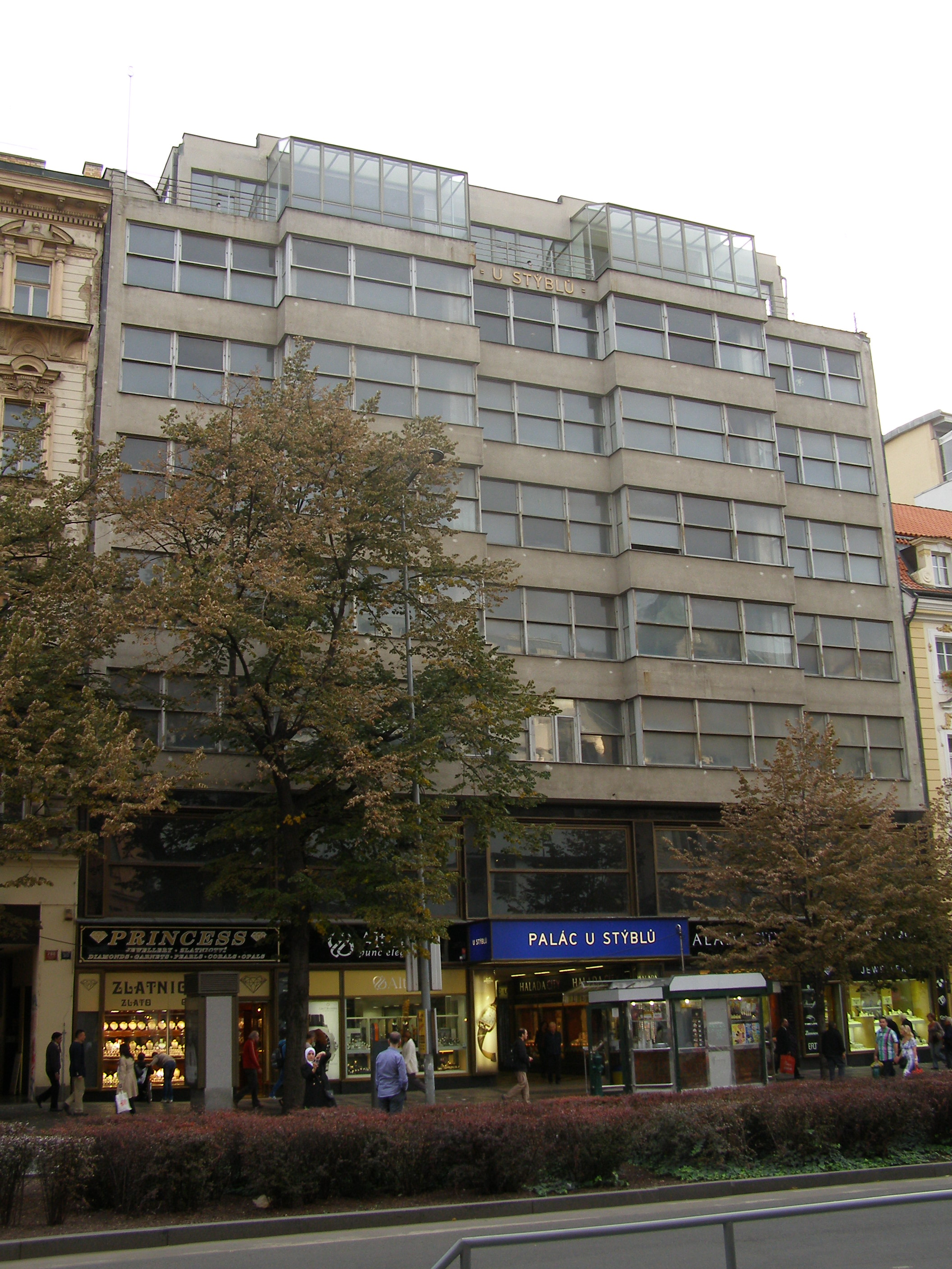 Palác Alfa, Praha 1-Nové Město, Václavské nám. 785/28.